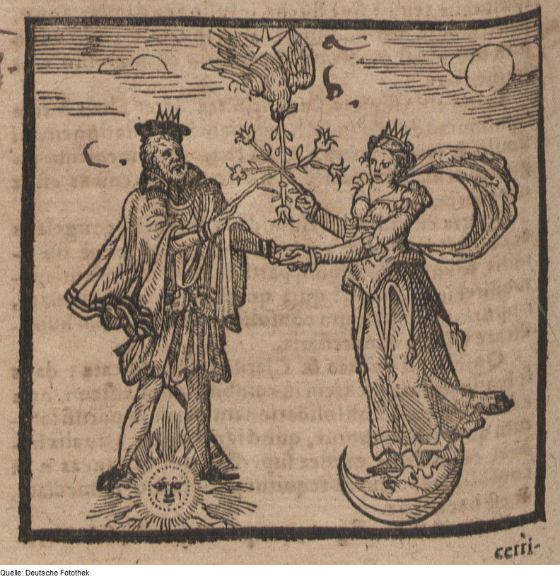 Original image description from the Deutsche FotothekTheosophie & Alchemie